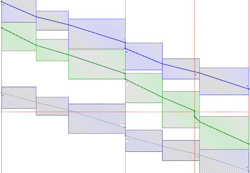 Bildfahrplan mit drei unterschiedlich schnellen Zügen und Sperrzeitentreppen, durch die deutlich wird, dass die Züge nicht in dieser Reihenfolge dichter hinterenander folgen könnten.